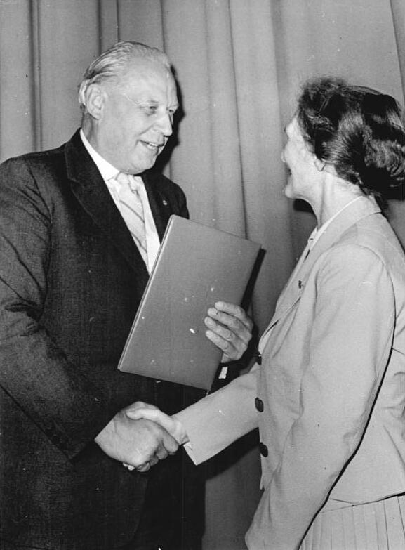 Zentralbild Eckleben 19.6.1961 3. Arbeiterfestspiele des FDGB. Literatur- und Kunstpreis des FDGB 1961 verliehen. Der Literatur- und Kunstpreis des FDGB 1961 wurde anlässlich der 3. Arbeiterfestspiele am 16.6.1961 in der Magdeburger Parkgaststätte "Herrenkrug" verliehen. Die Auszeichnung nahm der Vorsitzende des FDGB-Bundesvorstandes, Herbert Warnke, vor. UBz: Marianne Bruns erhält von Herbert Warnke den Literaturpreis des FDGB 1961.